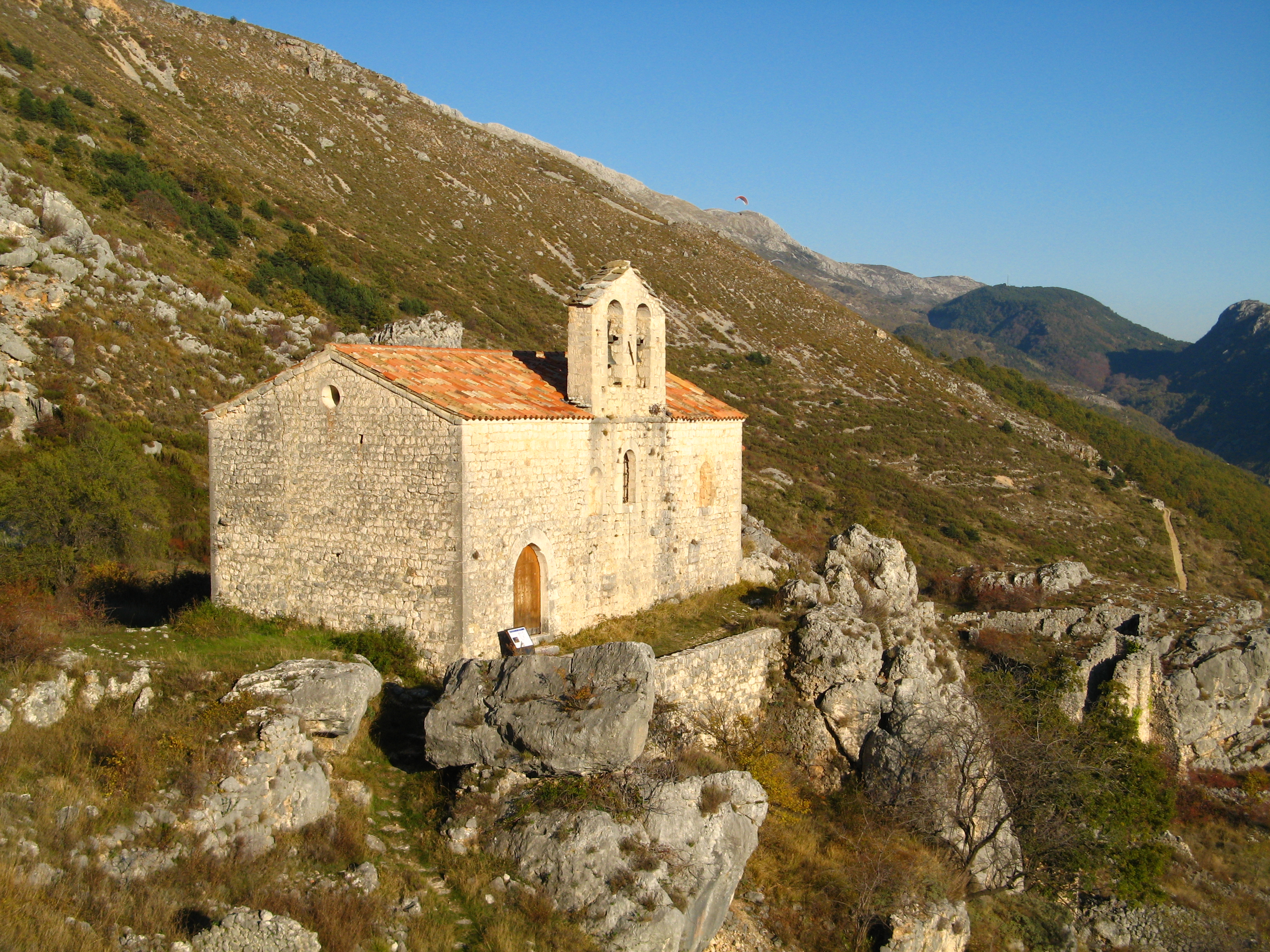 Chapelle Saint-Étienne de Gréolières Hautes (Alpes-Maritimes)